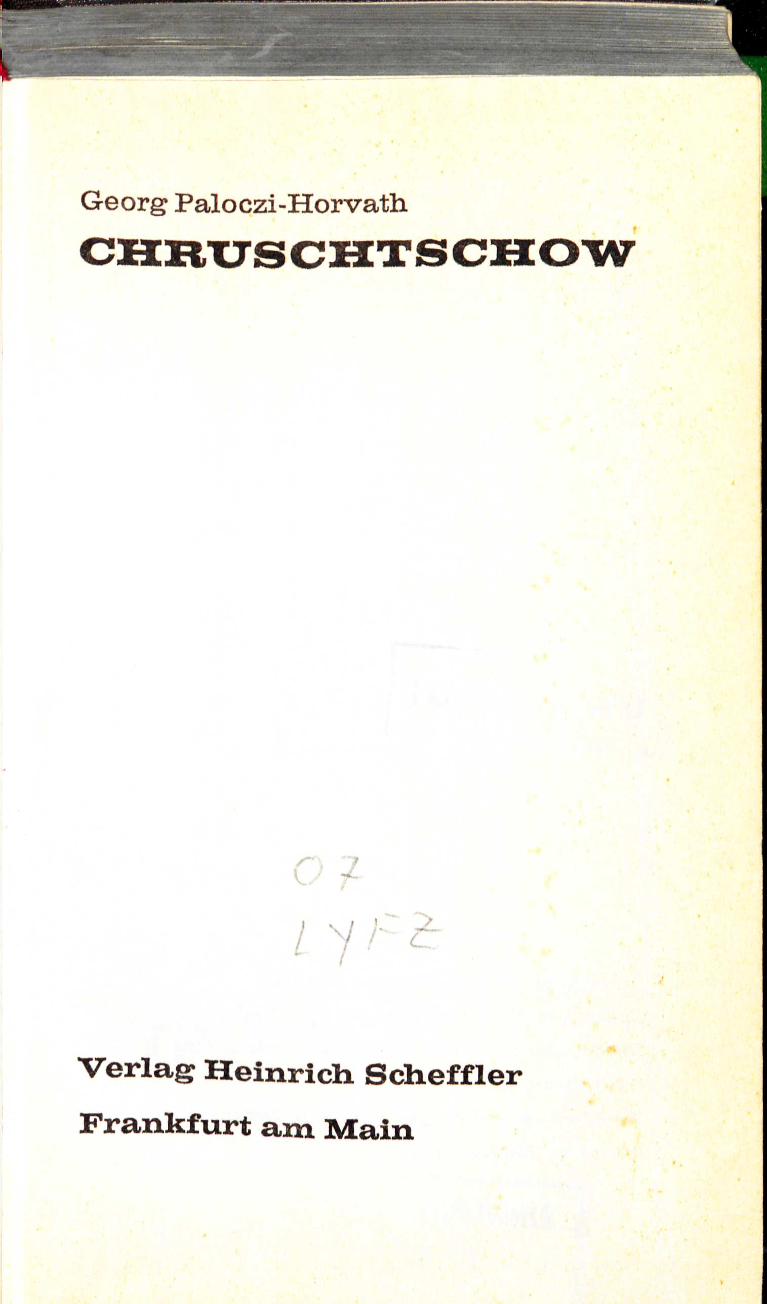 György Pálóczi Horváth Chruschtschow 1960 title